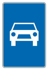 Знак за мотопут